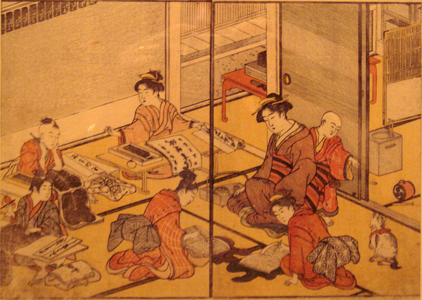 Teaching Reading And Writing, Izumiya Ichibei, 1790, Japan